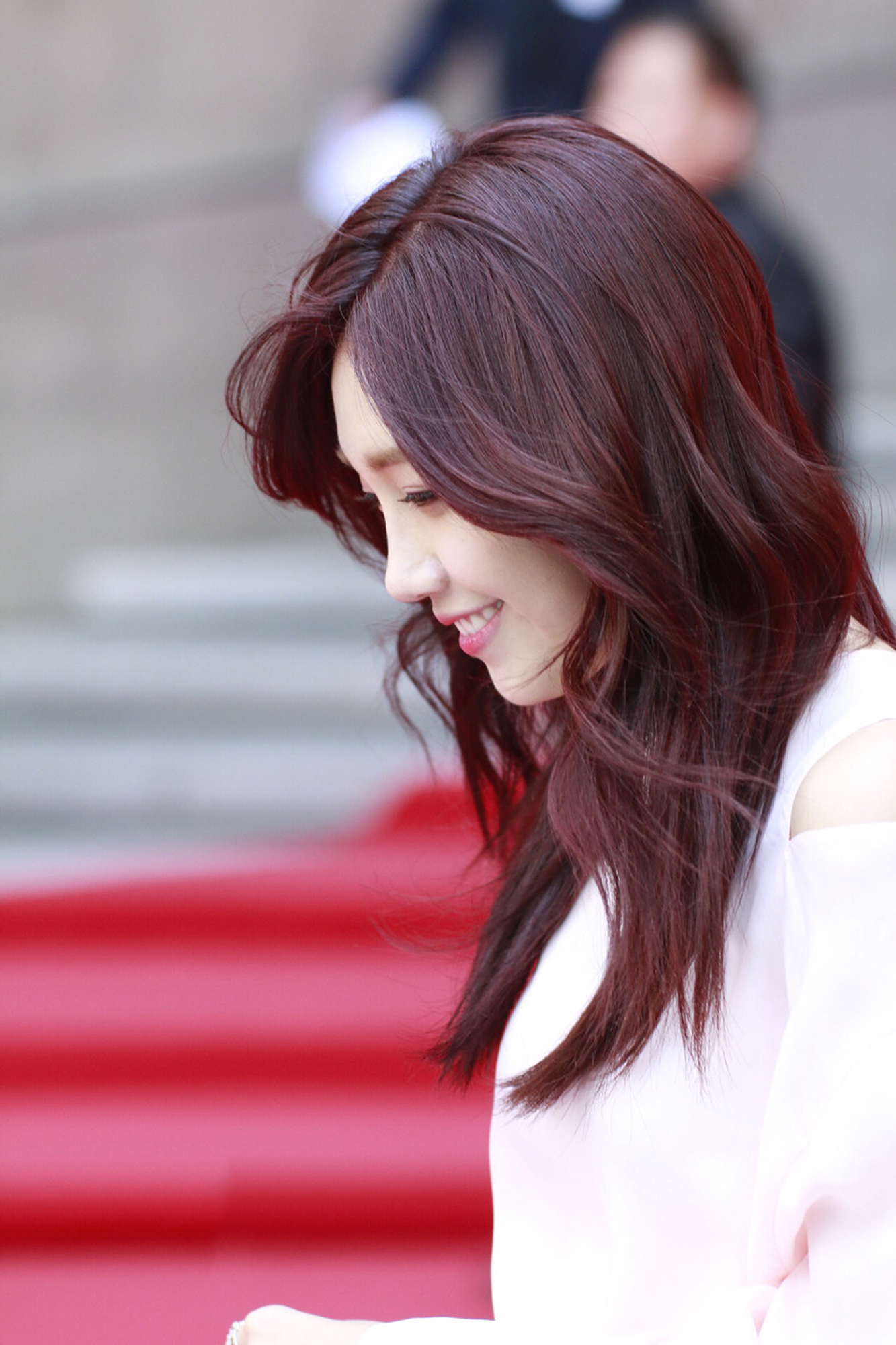 Jung Eun-ji at the Seoul Fashion Week on March 24, 2016.